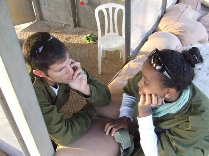 צילום של פארמדיק של הגדוד עם סמבצ"ית סדירה